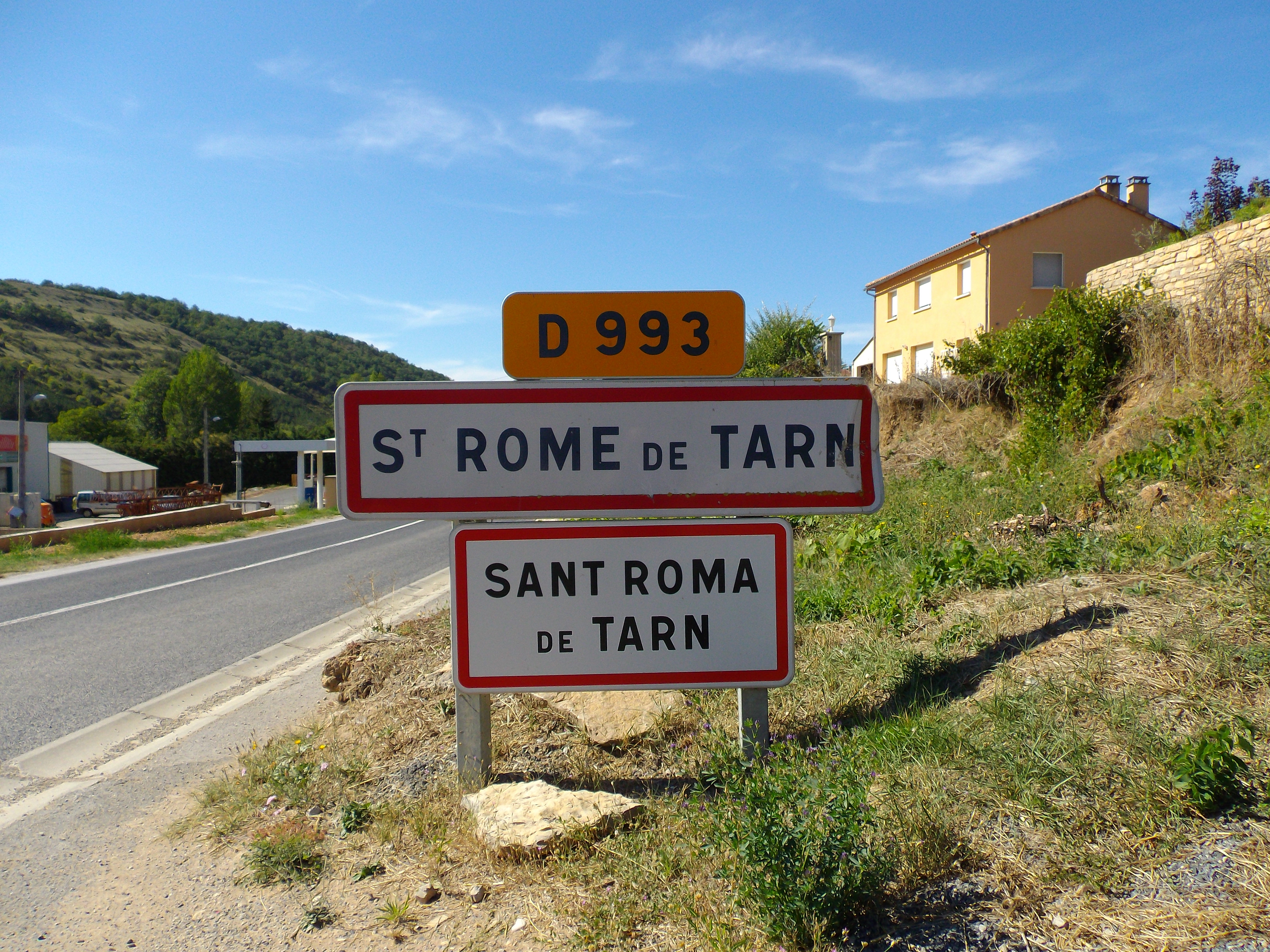 Panneau bilingue français-occitan à l'entrée de Saint-Rome-de-Tarn (Aveyron, France)